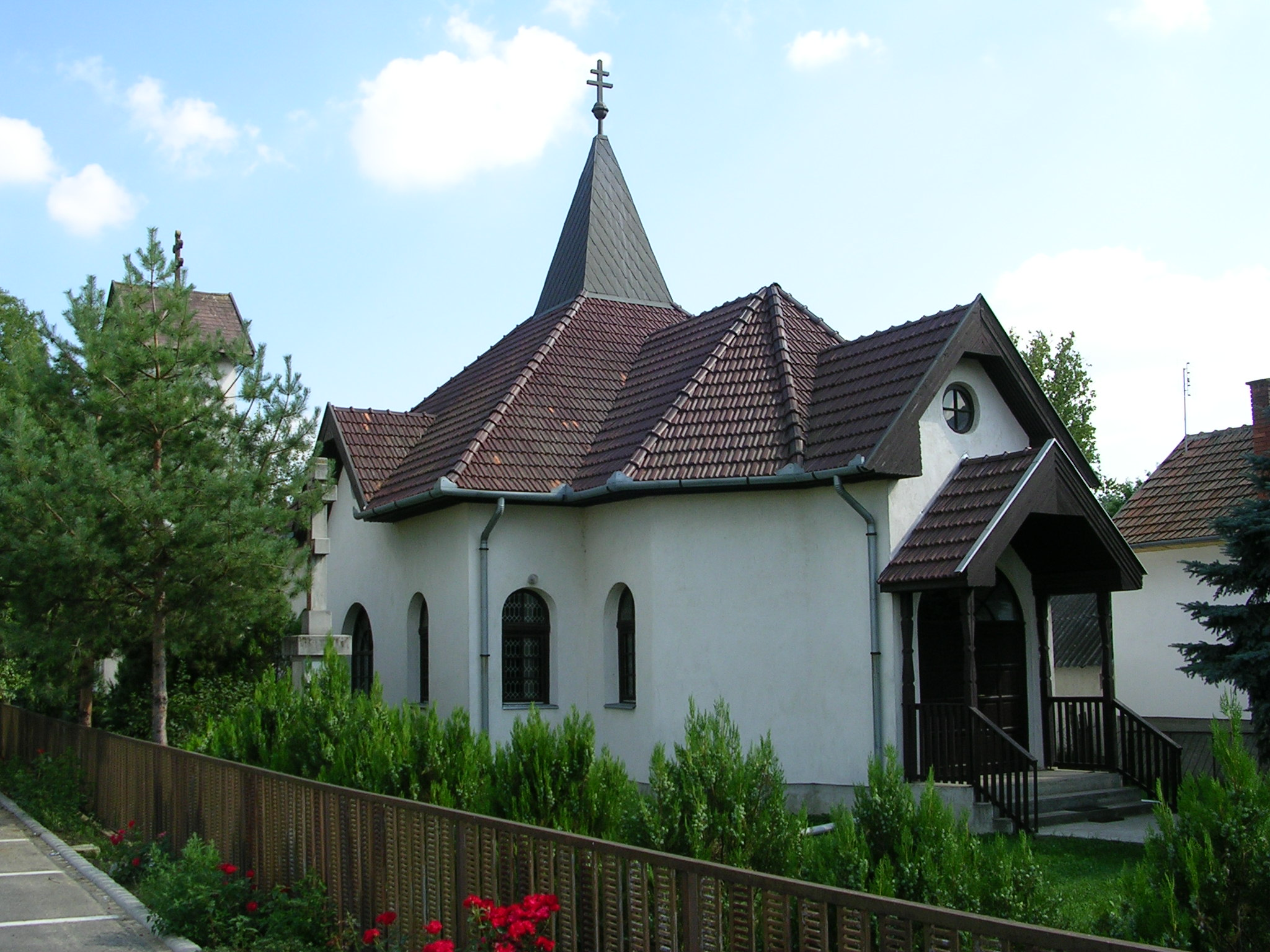 Nagyecsed Urunk színeváltozása görög katolikus temploma